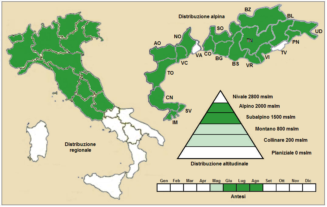 Aster alpinus - Distribuzione